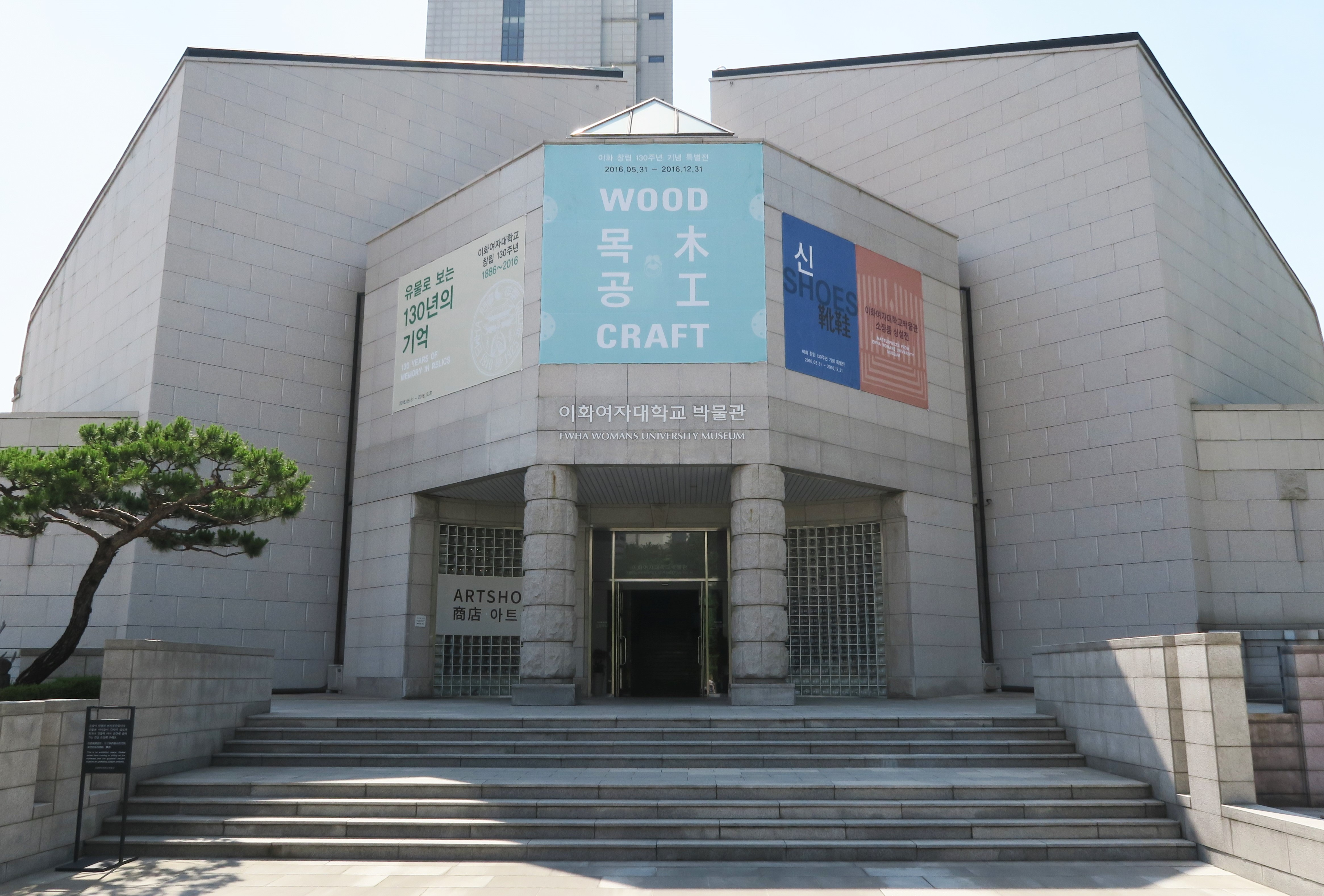 전시할 때 이화여대박물관 사진